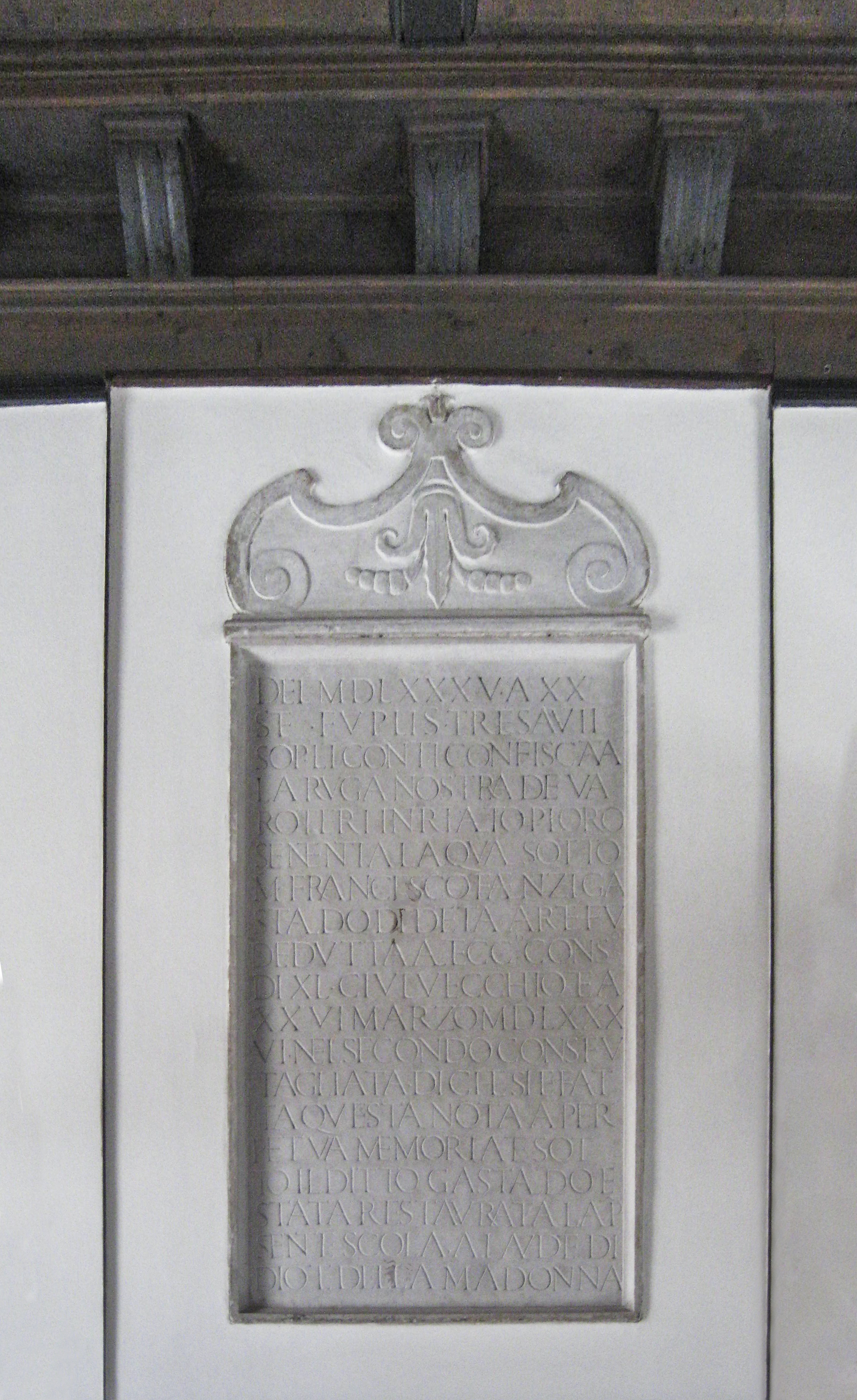 Iscrizione posta al primo piano dell'ex scuola dei "Varoteri" a Venezia